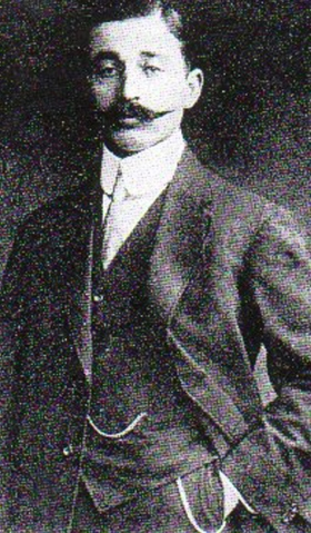 Hasan Fehmi Bey, Türk basın tarihinde öldürülen ilk gazeteci.